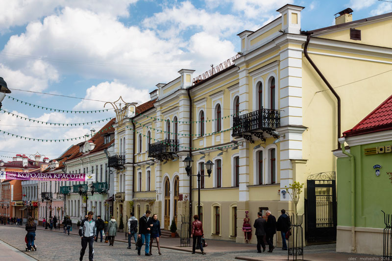 Гродна. Савецкая. Дом Ромера